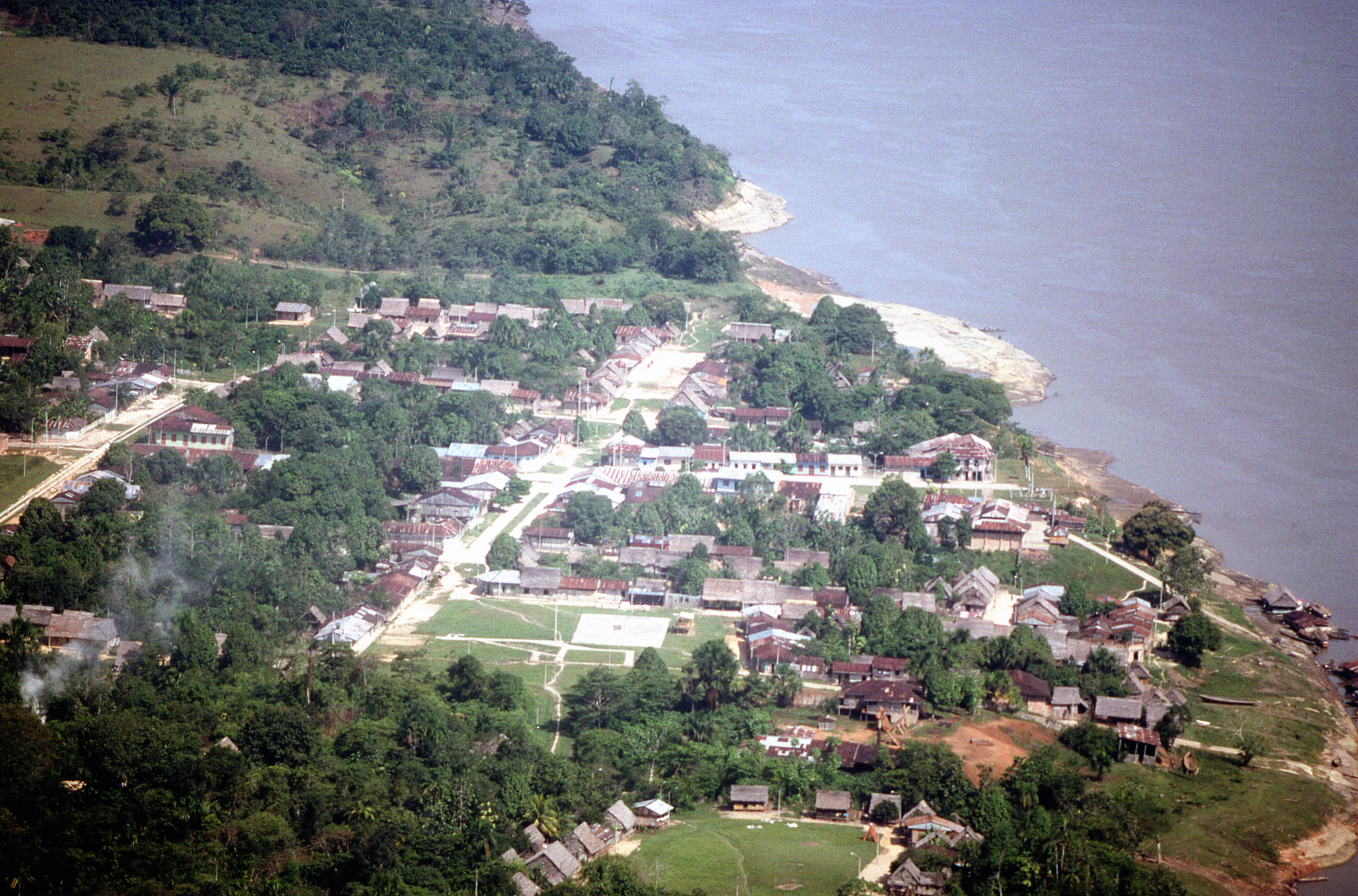 Iquitos_et_l'Amazonie_835_.jpg